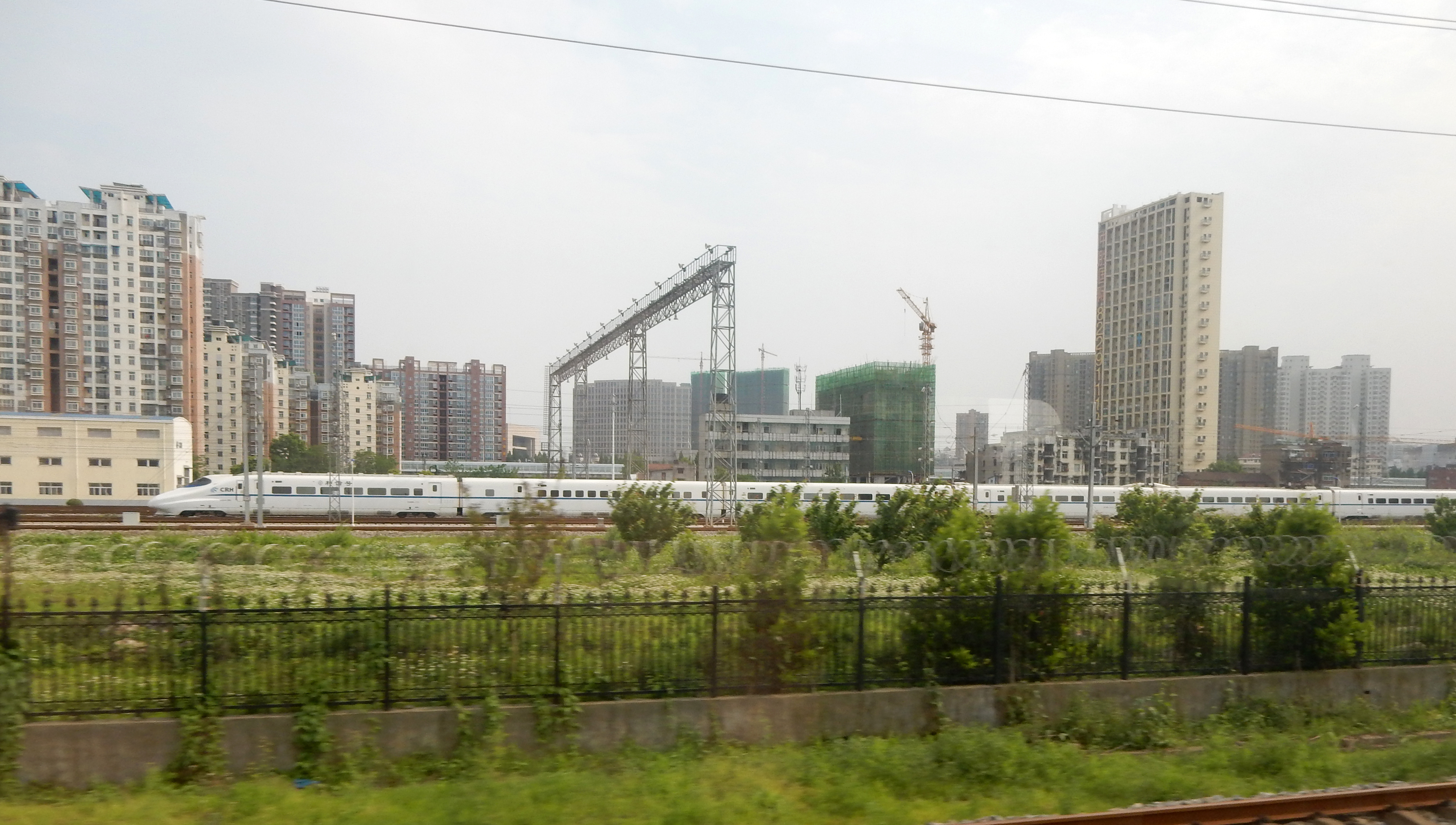 Leaving Wuhan